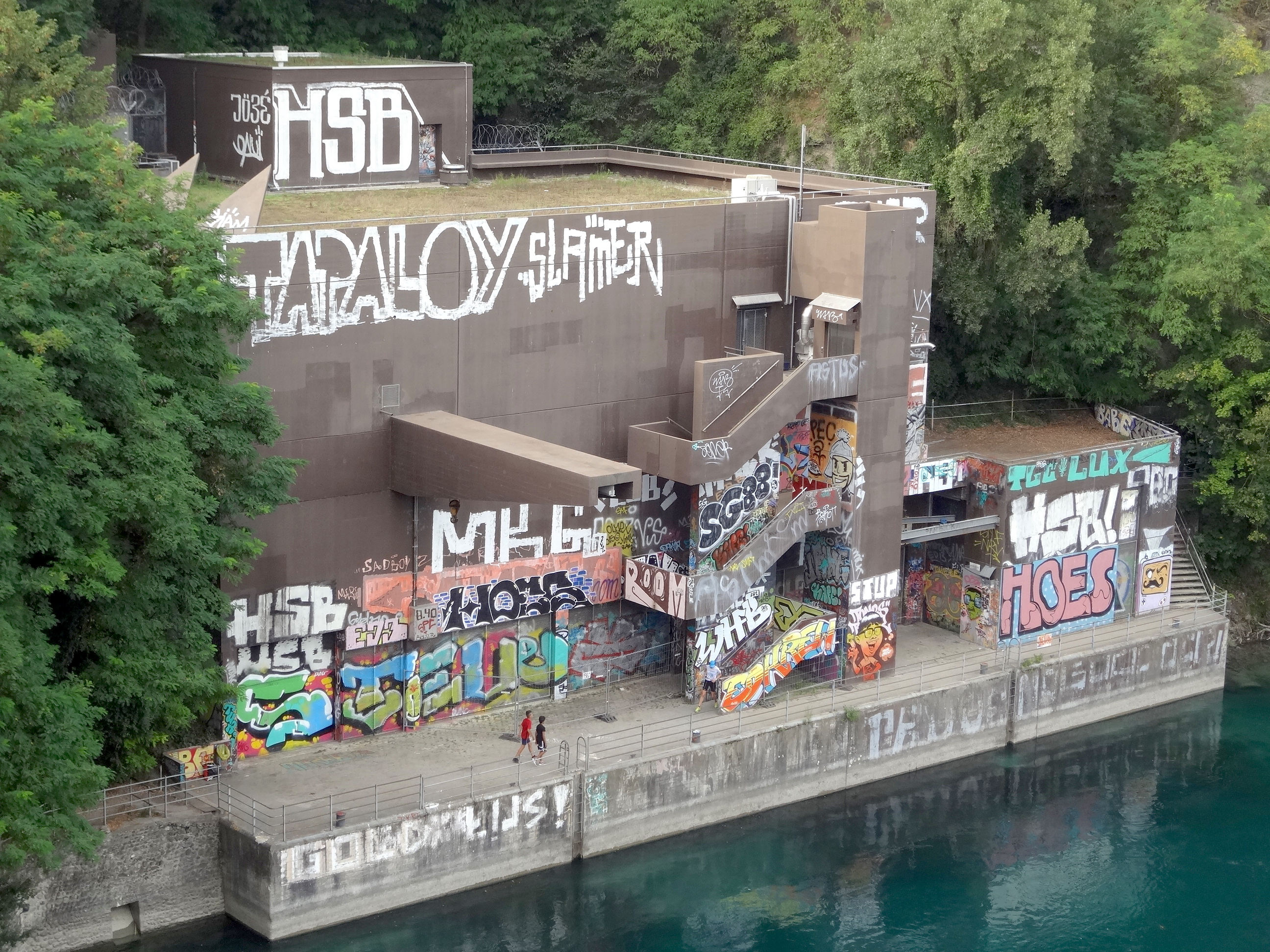 Services industriels de Genève : station de pompage des eaux usées de Saint-Jean.